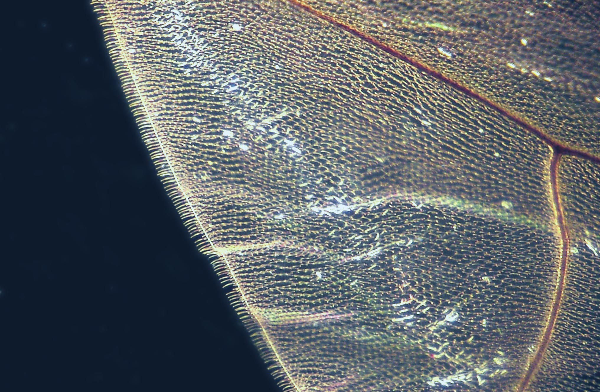 Rand eines Fliegenflügels bei ca. 200 fach im Dunkelfeld. Ausschnitt ca: 800µm x 500µm